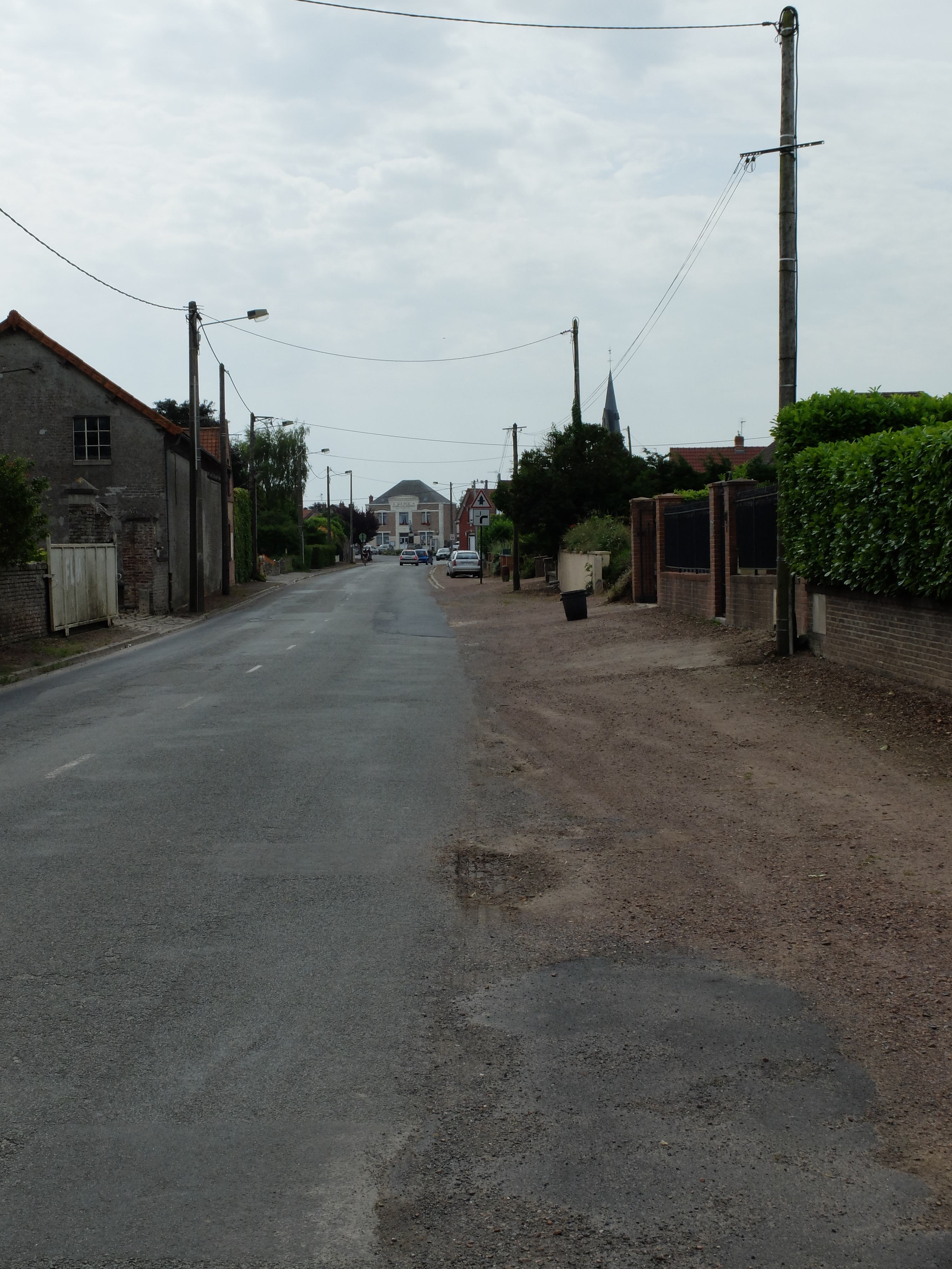 Vue d'une rue d'Hamblain-les-Prés.